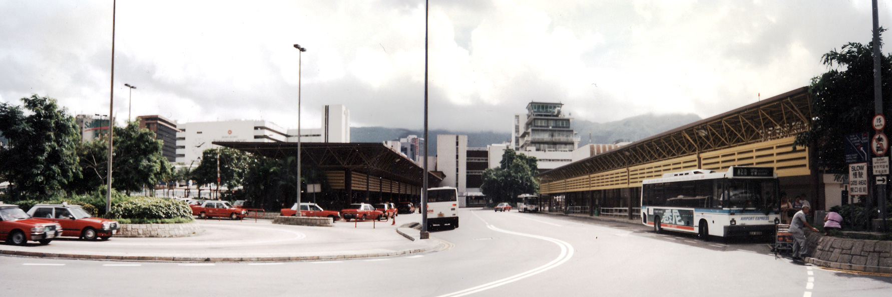 香港啟德機場客運大樓